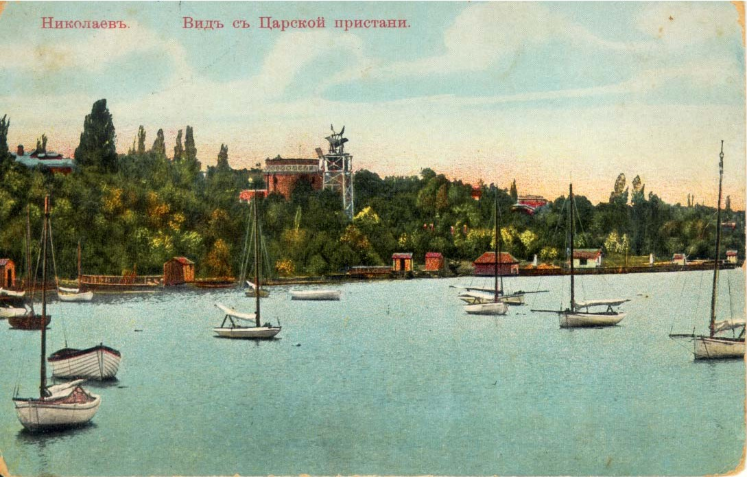 «Николаевъ. Видъ съ Царской пристани.» (Спасск)